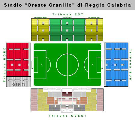 schema dei posti dello stadio "Oreste Granillo" di Reggio Calabria aggiornato al settembre 2009